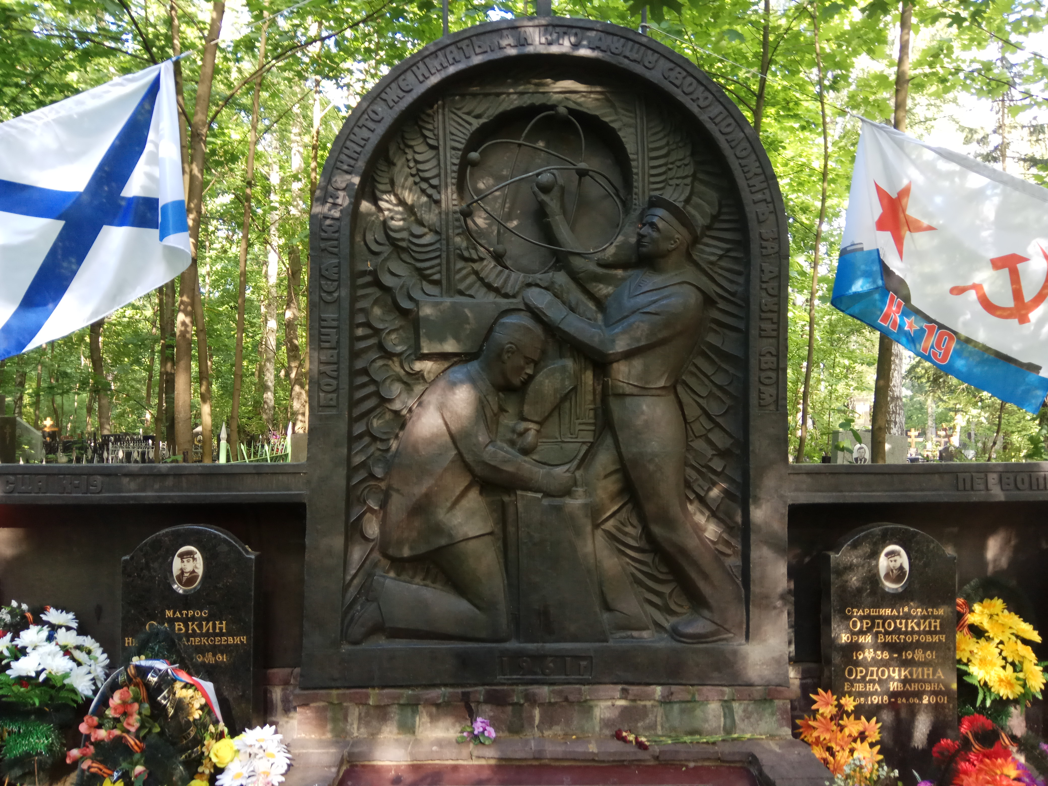 Памятник погибшим членам экипажа атомной подводной лодки К-19 на Кузьминском кладбище, Москва. Общий план. Памятник открыт 4 июля 1998 года